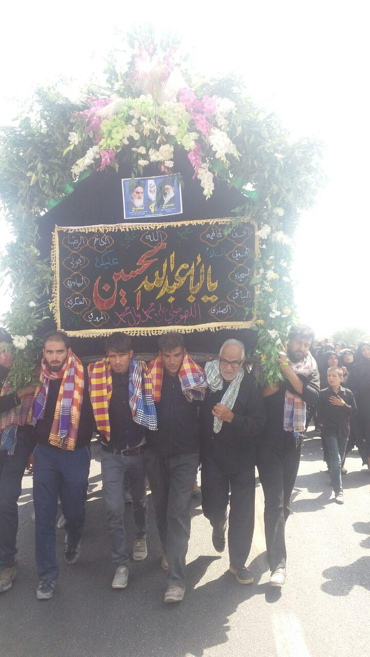 مراسم نخل برداری عاشورا روستای جوخواه